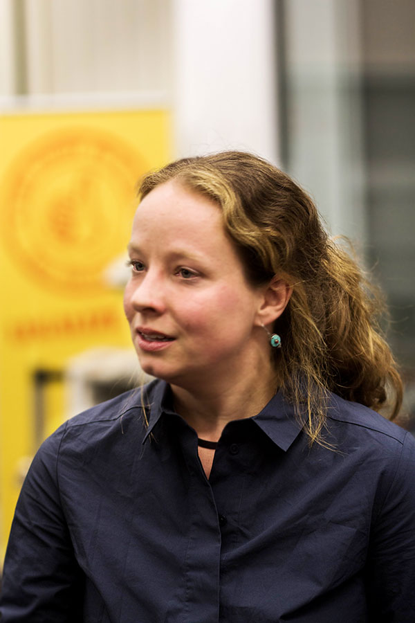 In der Stadtbibliothek Düsseldorf, las am 13.Oktober 2016 Wytske Versteeg aus ihrem Roman „Boy“.